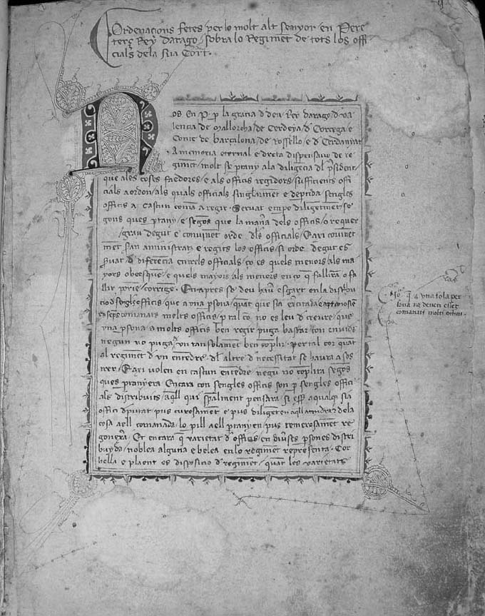 Ordenacions fetes per lo molt alt senyor en Pere terç Rey darago sobre lo regiment de tots los officials dela sua cort Biblioteca de la Universitat de València s/s f.1